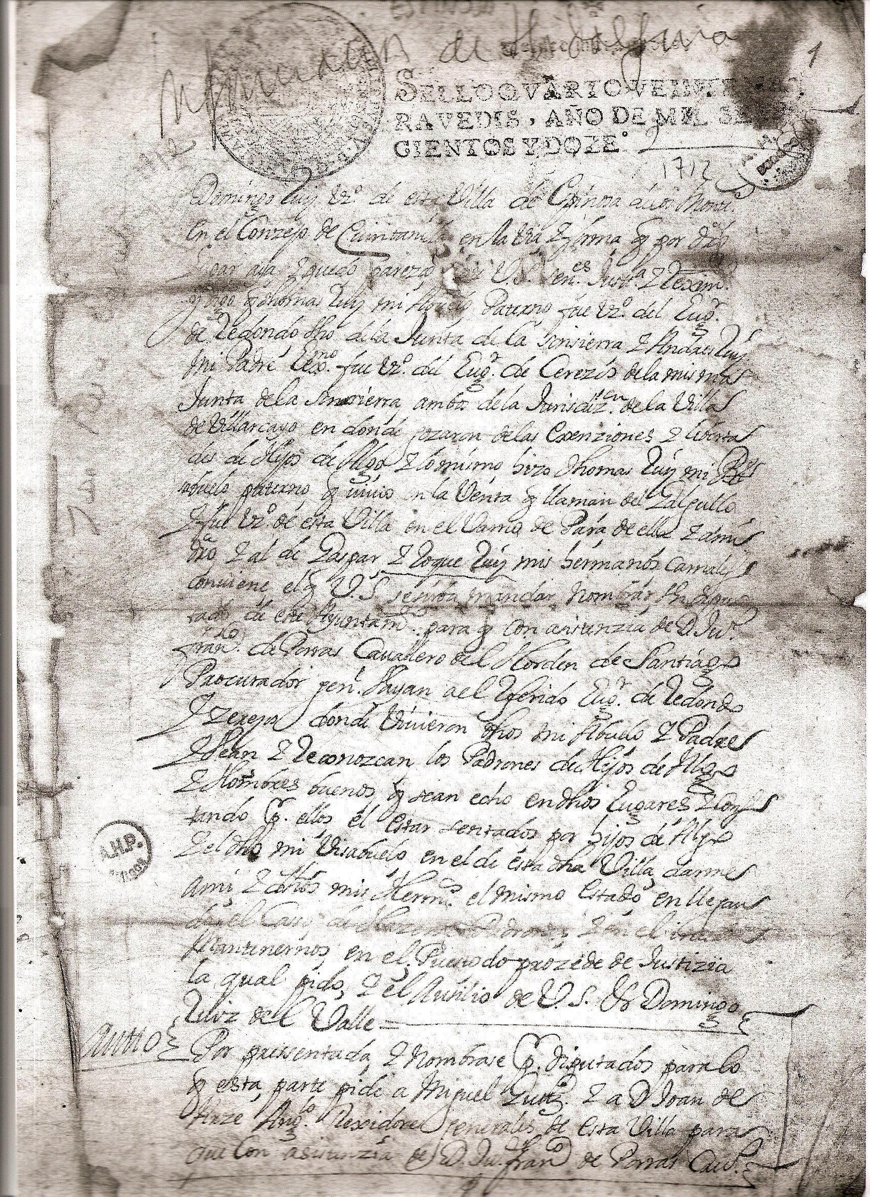 Información de hidalguia de Domingo Ruiz del Valle pag.1